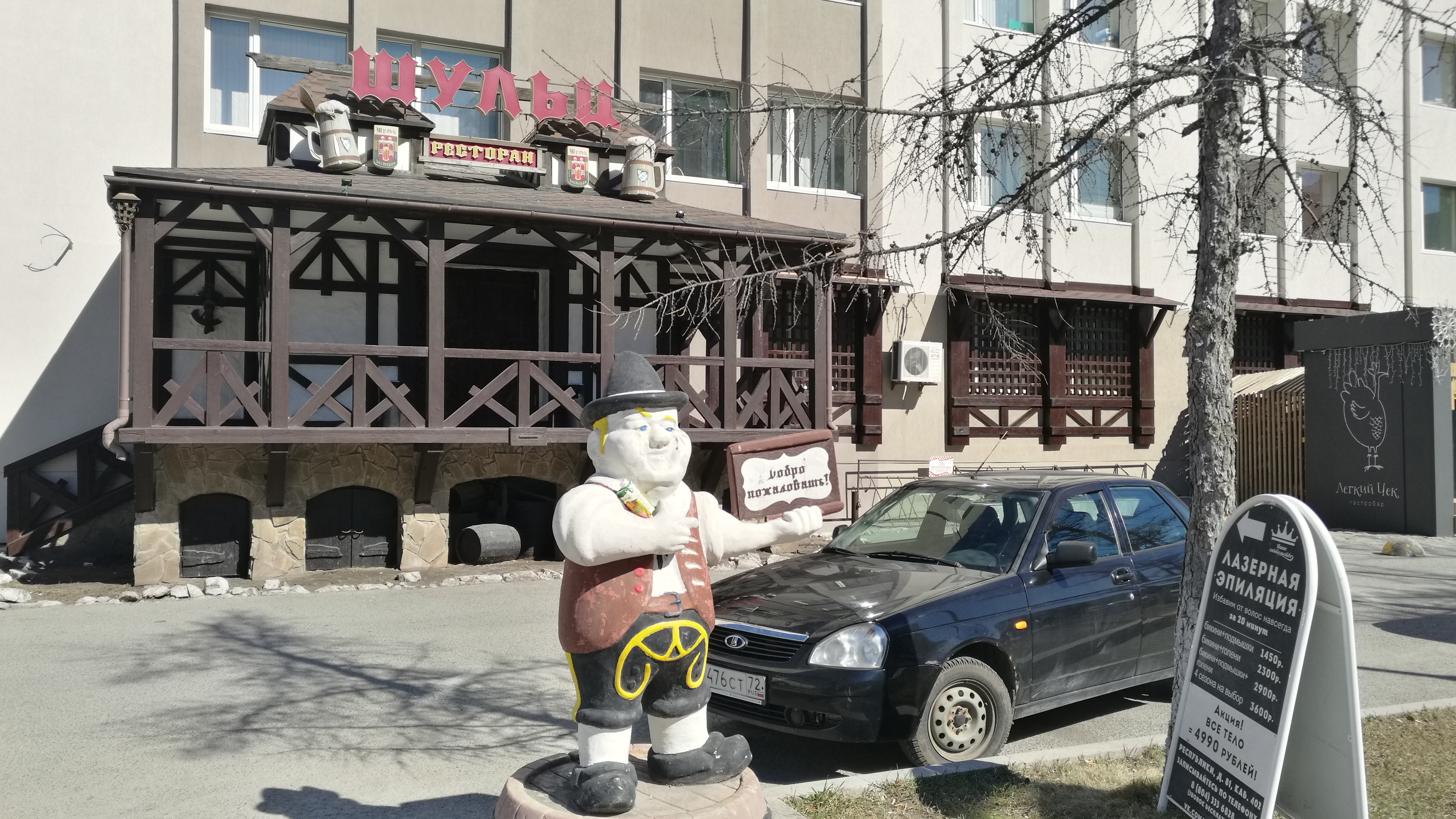 Strato Respubliko. Tjumeno, Rusio.